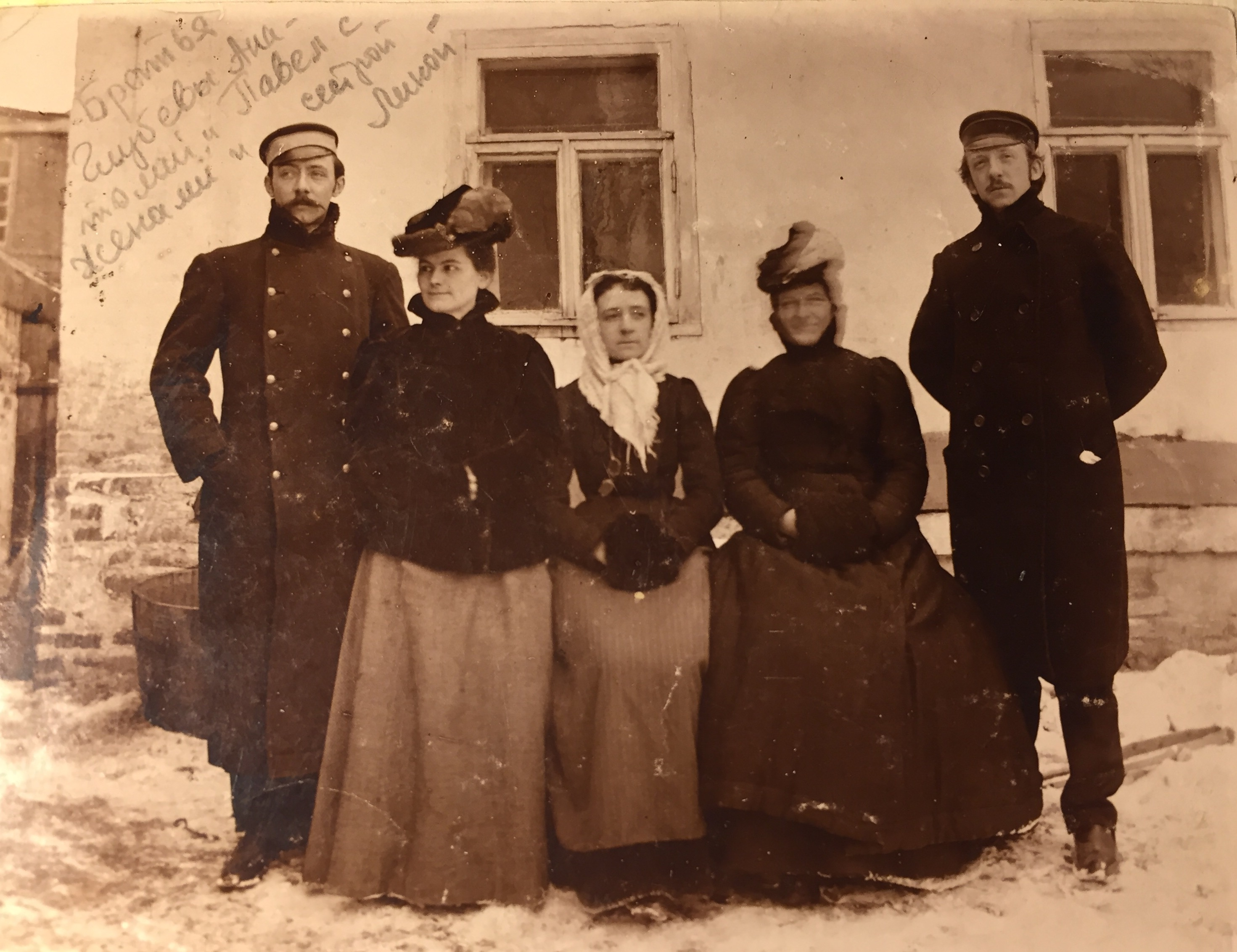 Слева направо: брат Анатолий стеной, сестра Аполлинария(Лина), жена и сам Павел Голубев.